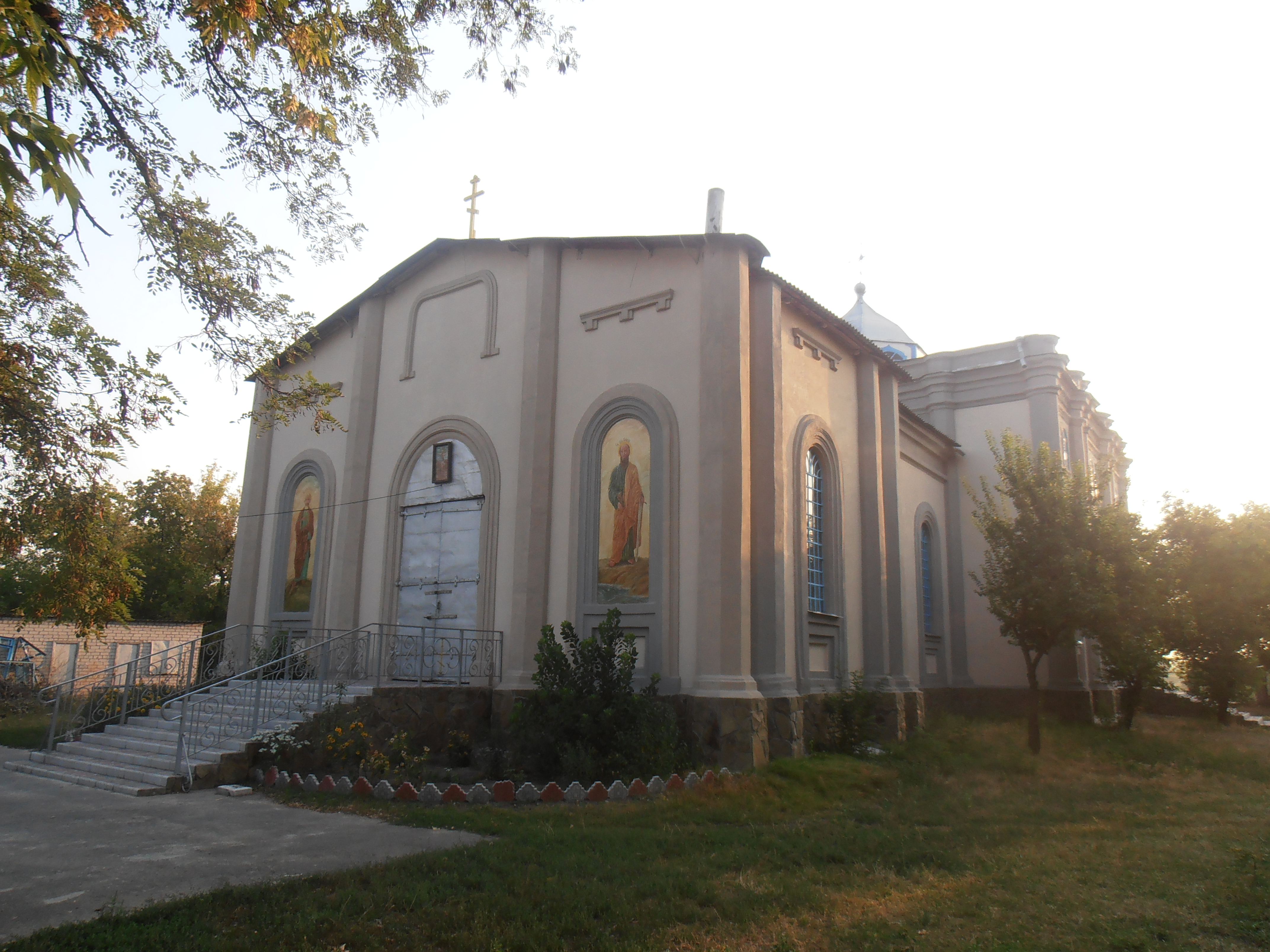 Миколаївський храм у смт. Борівське